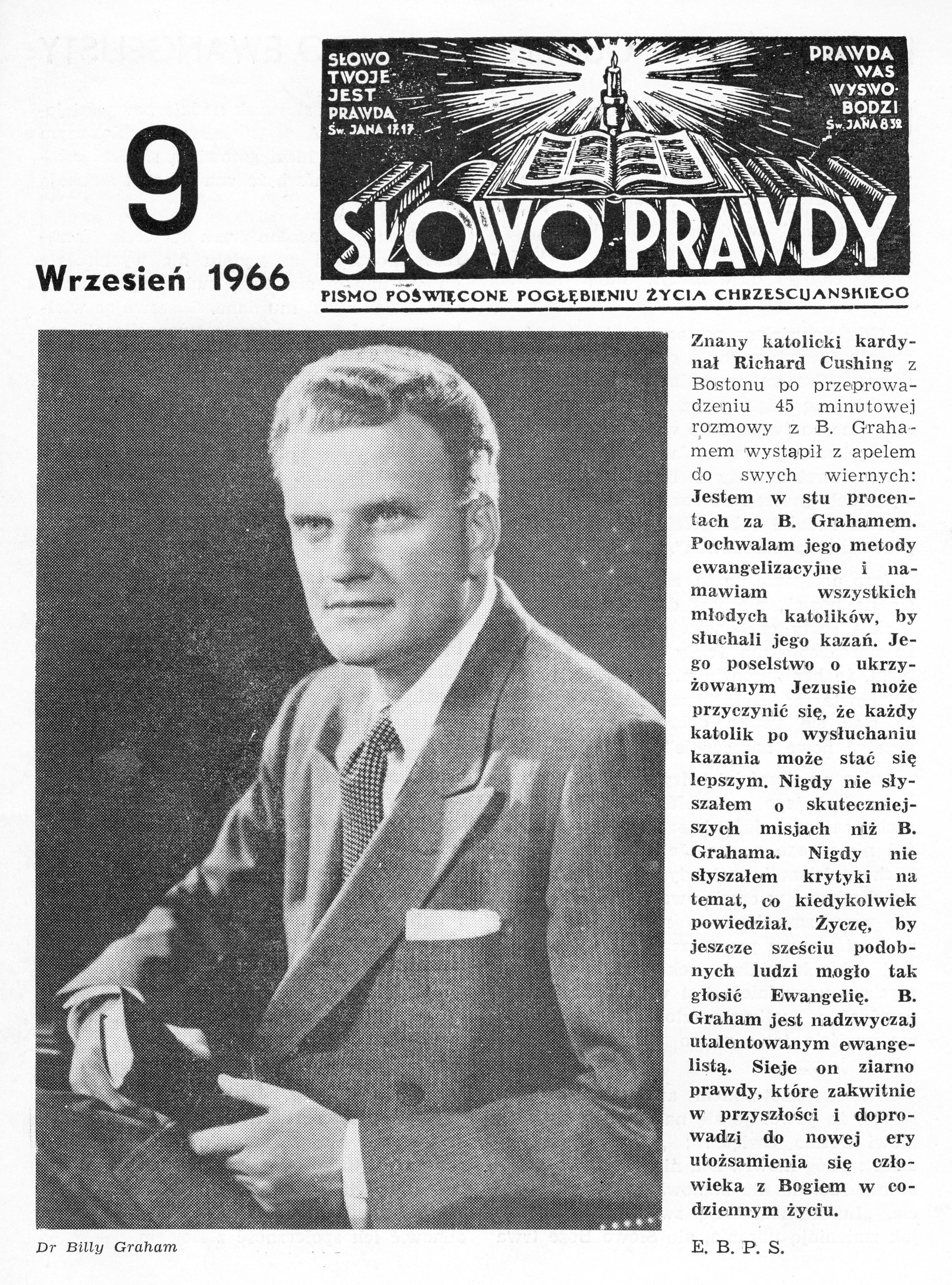 Billy Graham on the front page of "Słowo Prawdy" 1966 nr 9 page 1